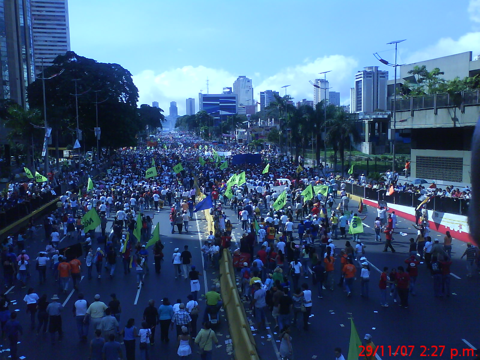 Cierre de campaña por el NO en la propuesta de Reforma Constitucional en Venezuela.